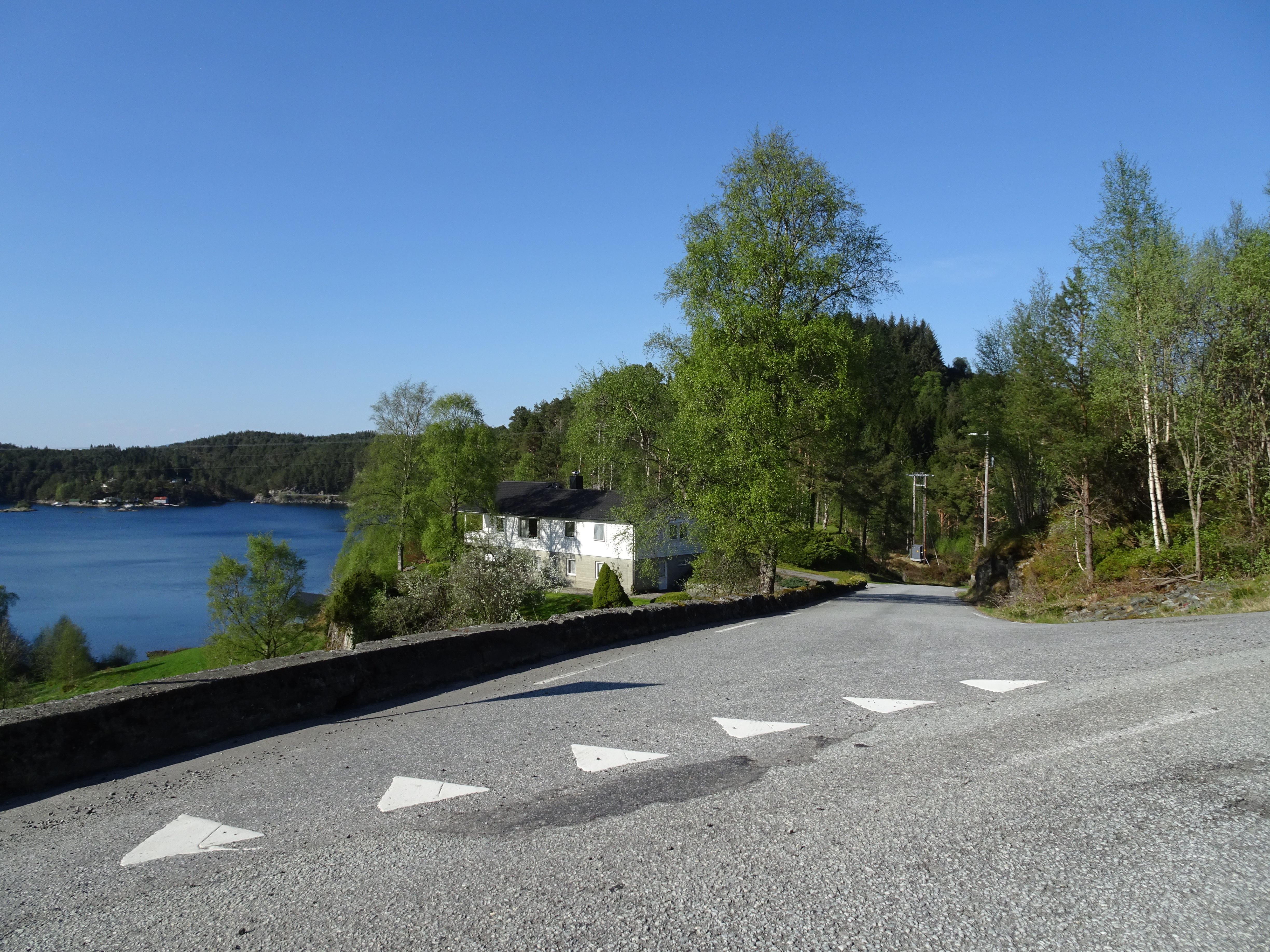 Sørenden av Godøysundvegen (fylkesvei 80), øst for Våge i Tysnes